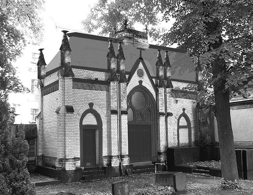 Mausoleum Carl Bolle, Alter St.-Matthäus-Kirchhof, Berlin. Fotomontage Zustand vor 1945. Foto und Grafik: Ludger Wekenborg (StMatthaeus)